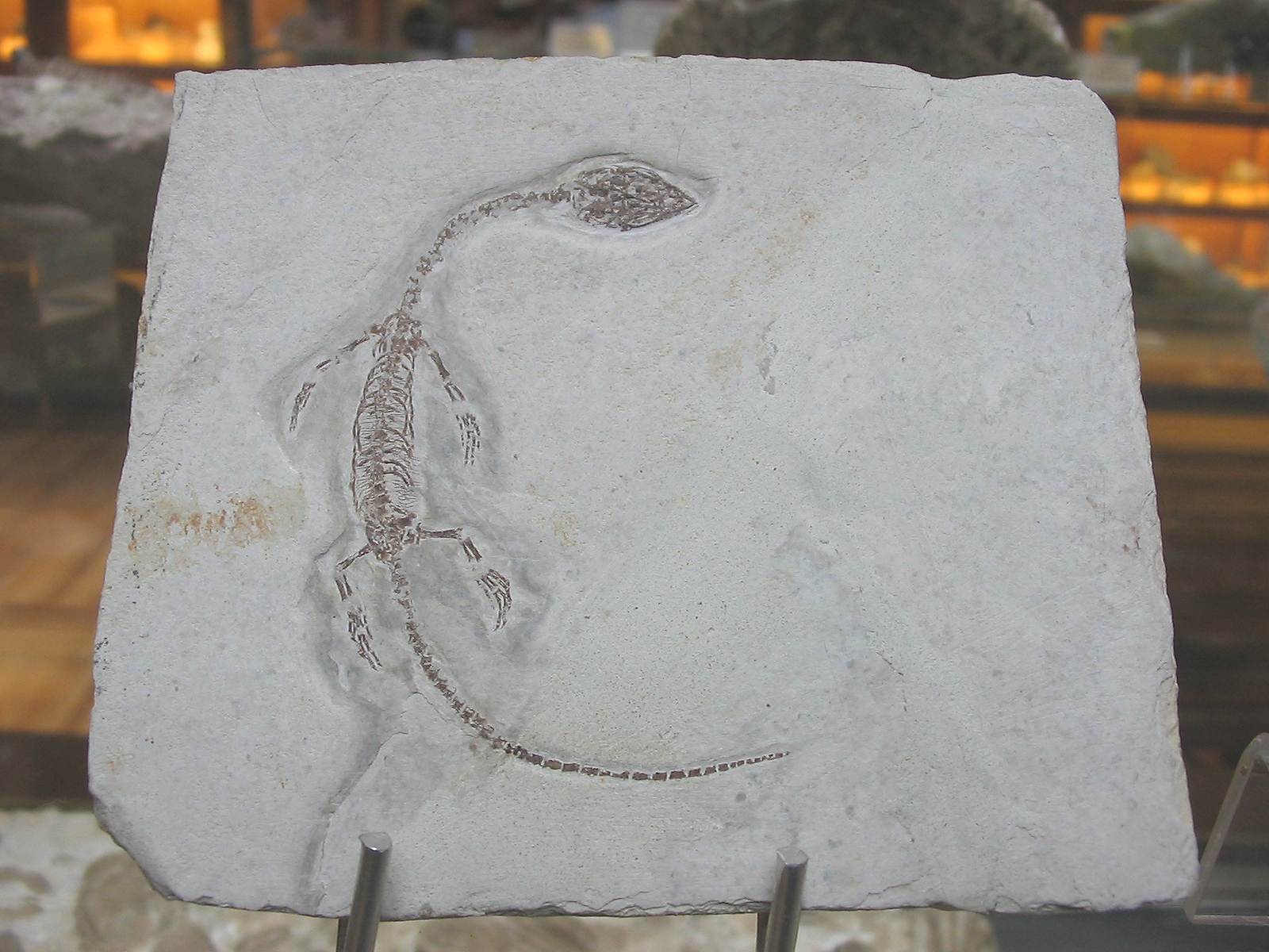 Fotografía realizada por Pablo Alberto Salguero Quiles en el museo minero de Madrid (ESP). Ejemplar conpleto de Hyphalosaurus lingyuanensis, del Jurásico superior y de que se encontró en Liaoning (China). La fot está retocada con el Adobe Photoshop para darle un poco de claridad.